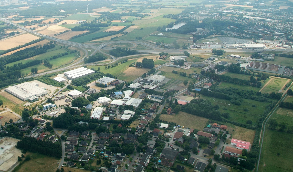 Autobahndreieck Delmenhost; im Anflug auf den Flughafen Bremen; Anflug auf die Landebahn 09; von Westen kommend; östlicher Ortsrand von Delmenhorst; 7 km vor der Landeschwelle der Bahn 09; Blick nach Süden; Einkaufszentrum Zurbrüggen - rechts oben im Bild; Autobahndreieck Delmenhost; die A28 führt rechts nach Oldenburg und links oben zur A 1 in die sie nach 3 km am Autobahndreieck Stuhr einmündet; nach links unten zweigt die B 75 nach Bremen ab; am rechten Bildrand - etwas über der Mitte das Gewerbegebäude mit dem roten Dach (neben dem golfplatzähnlichen Park) ist GEHE Delmenhost - ein Pharmagroßhändler, der sich von der Celesio AG abgespalten hat) Coordinates N 53° 02' 40.47 E 8° 40' 05.59 view to the south